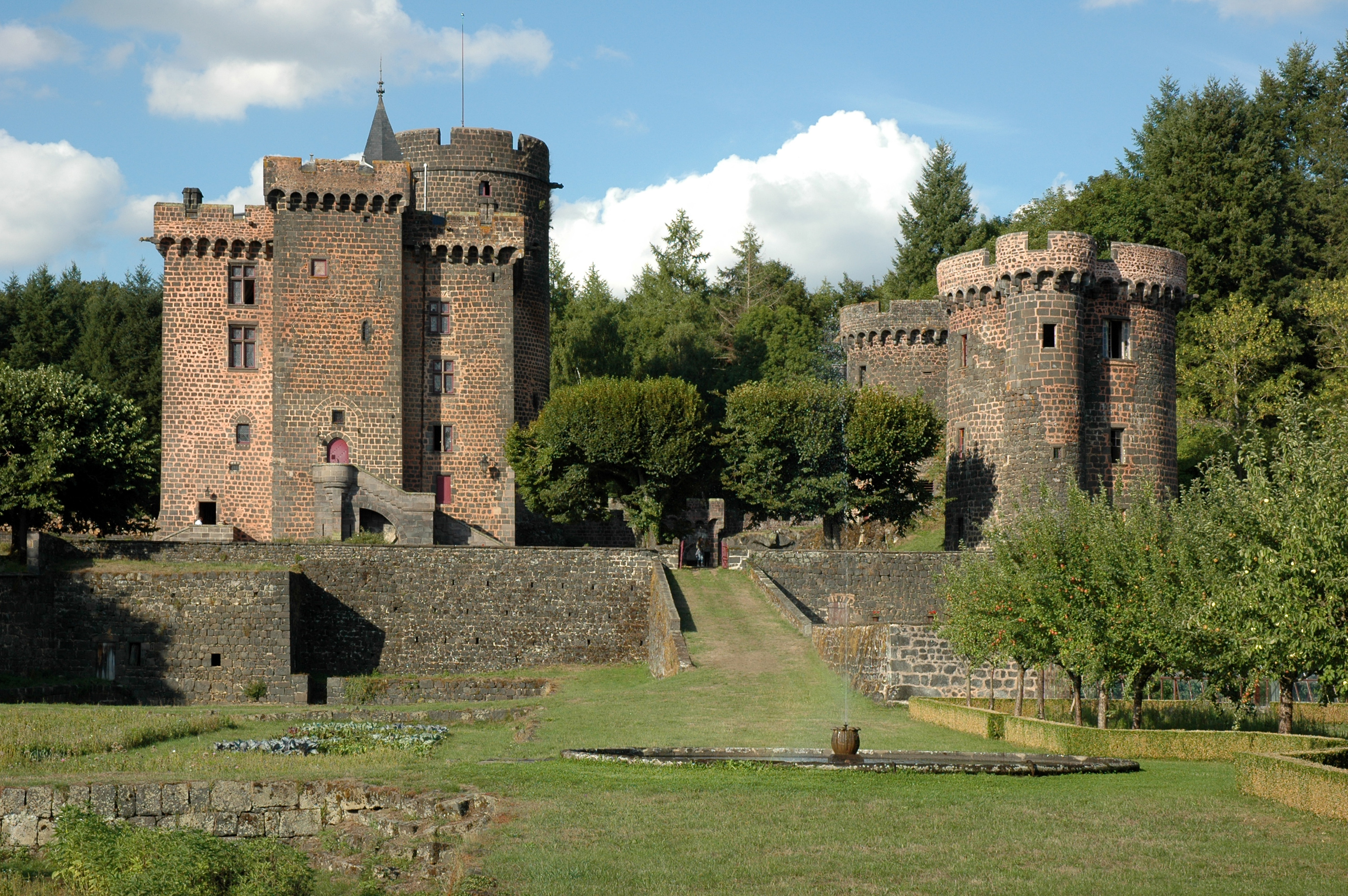 Château-Dauphin à Pontgibaud